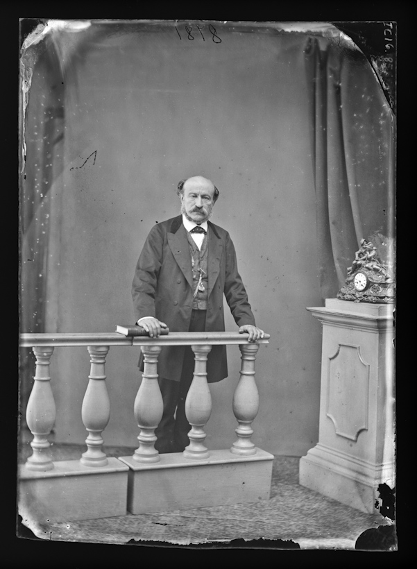 Obra que integra o acervo do Museu Paulista da USP. Coleção Militão Augusto de Azevedo.